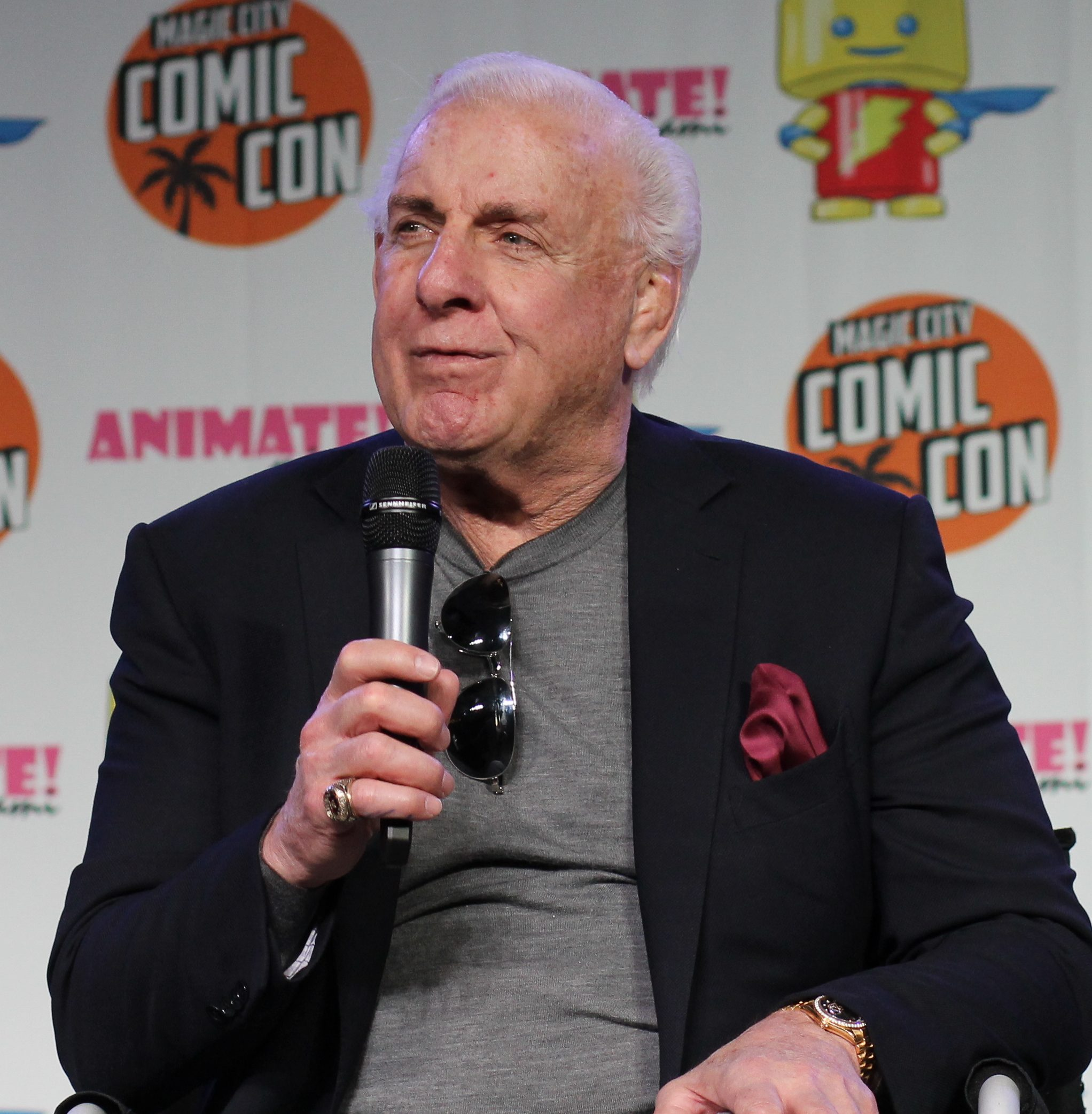 MCCC16 c3_0637-100